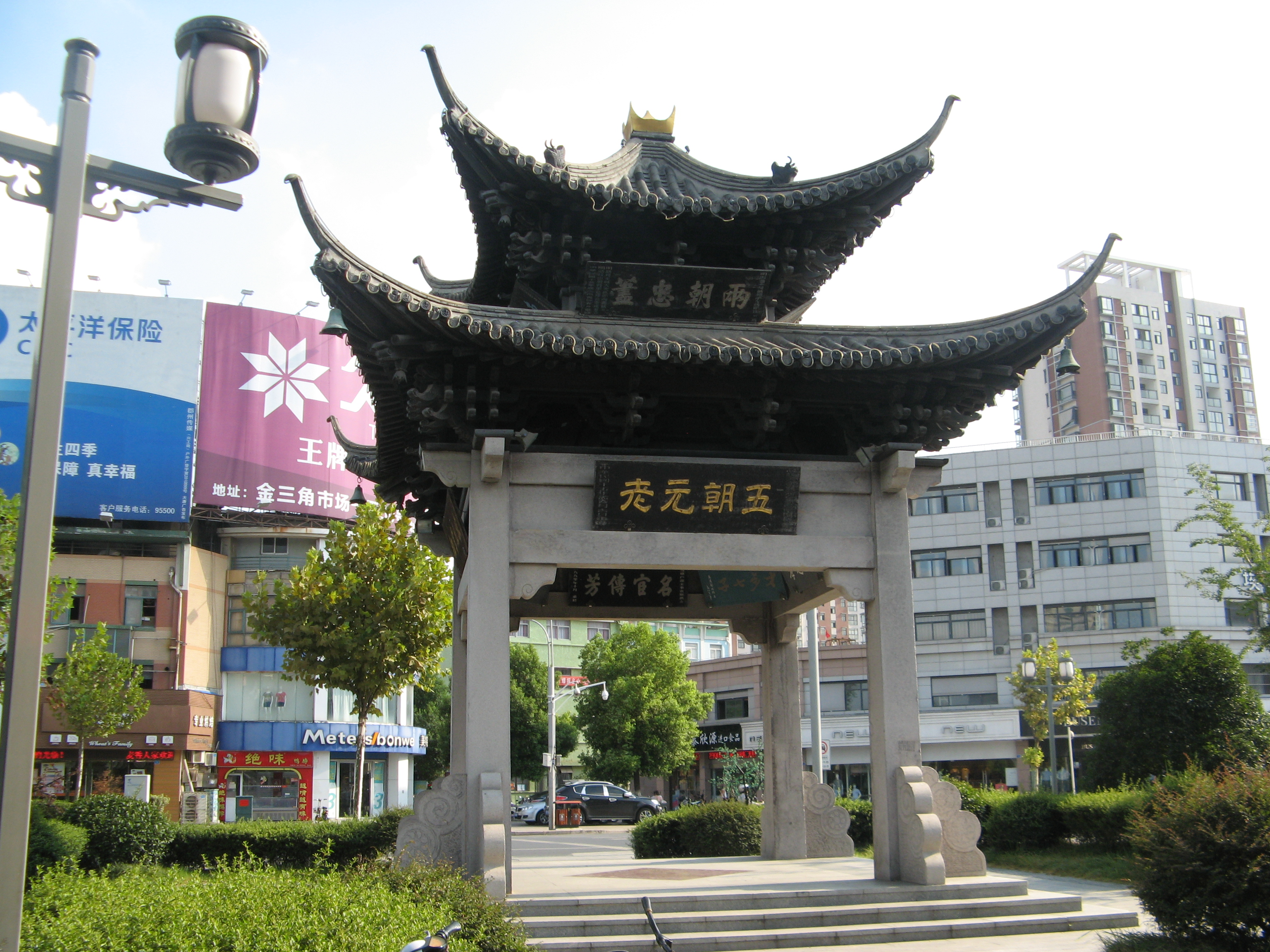 中文（中国大陆）: 四牌楼（兴化），兴化古城的象征